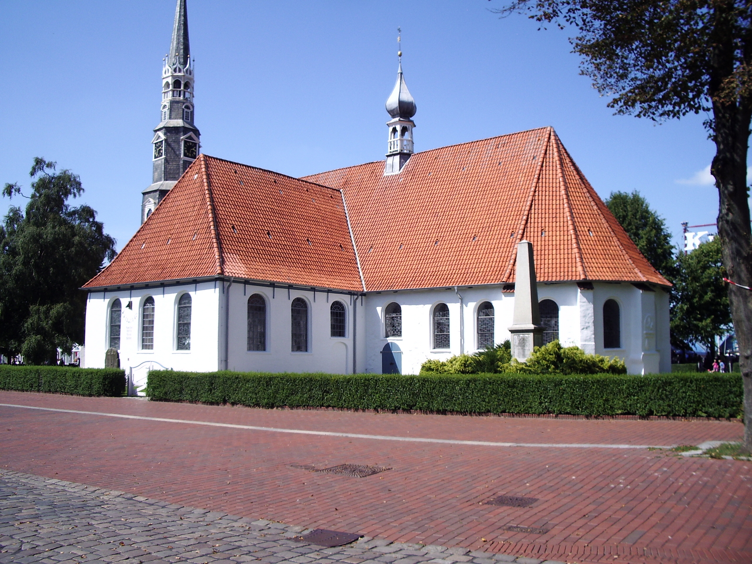 Die St. Jürgen Kirche auf dem Heider Marktplatz